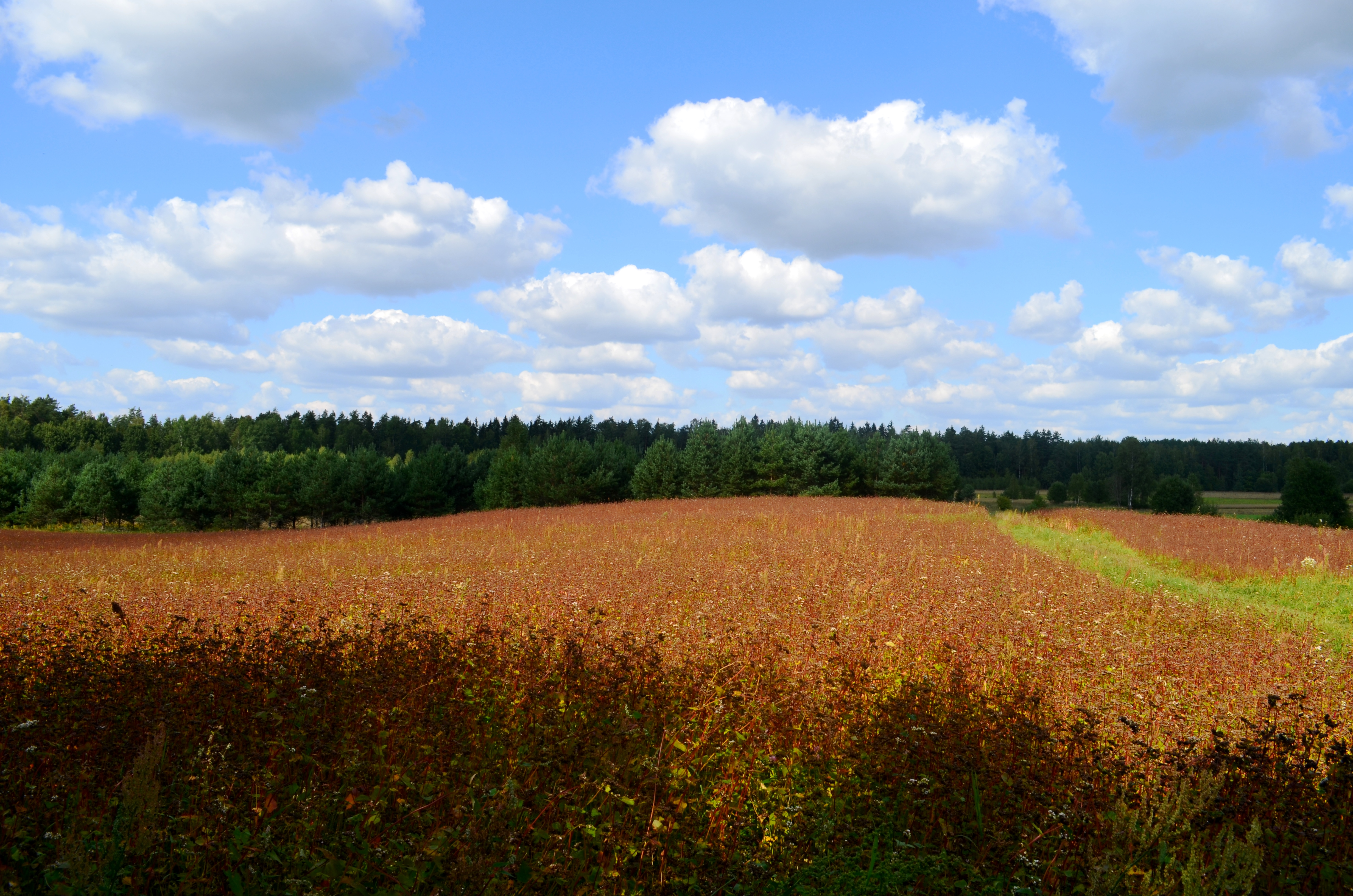 Grikių laukai Dieveniškių krašte, Šetylos, Šalčininkų raj.